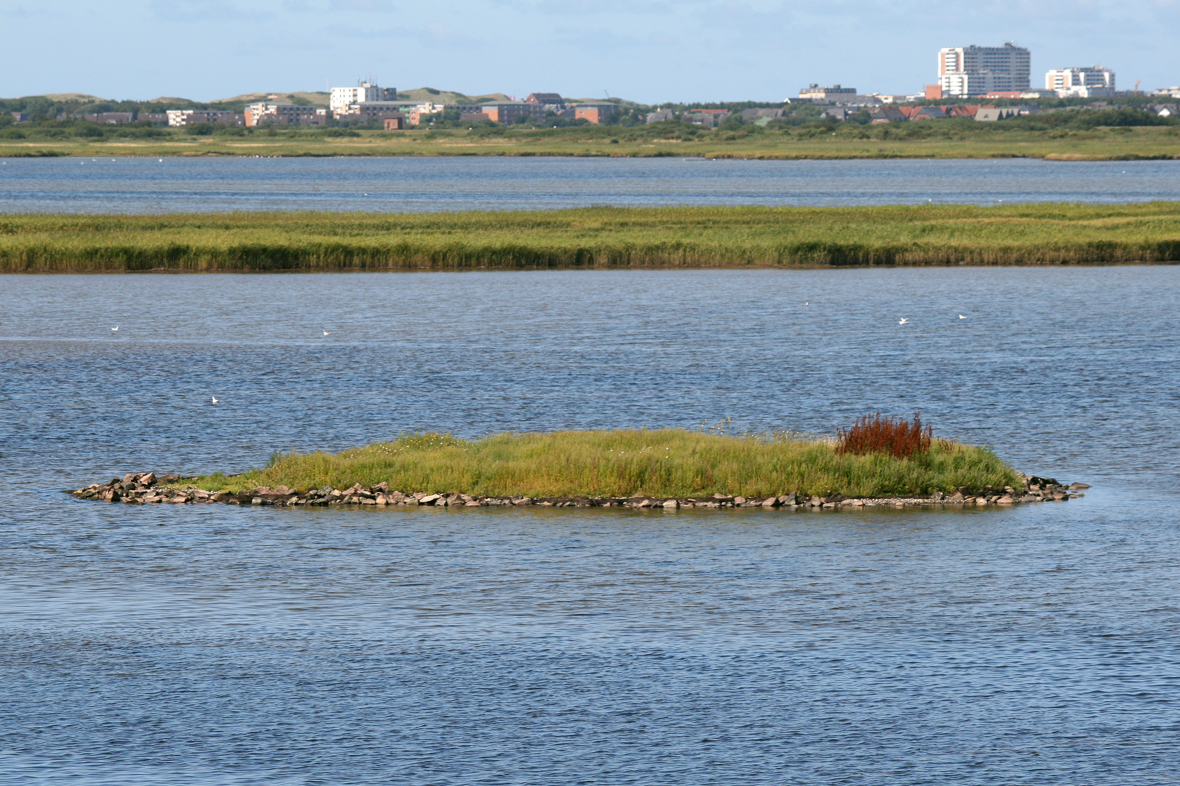 Rantumbecken, Naturschutzgebiet auf der Insel Sylt, im Hintergrund Häuser von Westerland.